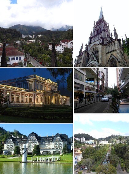 Montagem com pontos relevantes da cidade de Petrópolis, no estado do Rio de Janeiro. Coluna da esquerda = Vista lateral da Catedral São Pedro de Alcântara, Museu Imperial, e Palácio Quitandinha (De cima para baixo). Coluna da direita = Catedral São Pedro de Alcântara, Rua 16 de Março, e Vista aérea da cidade.